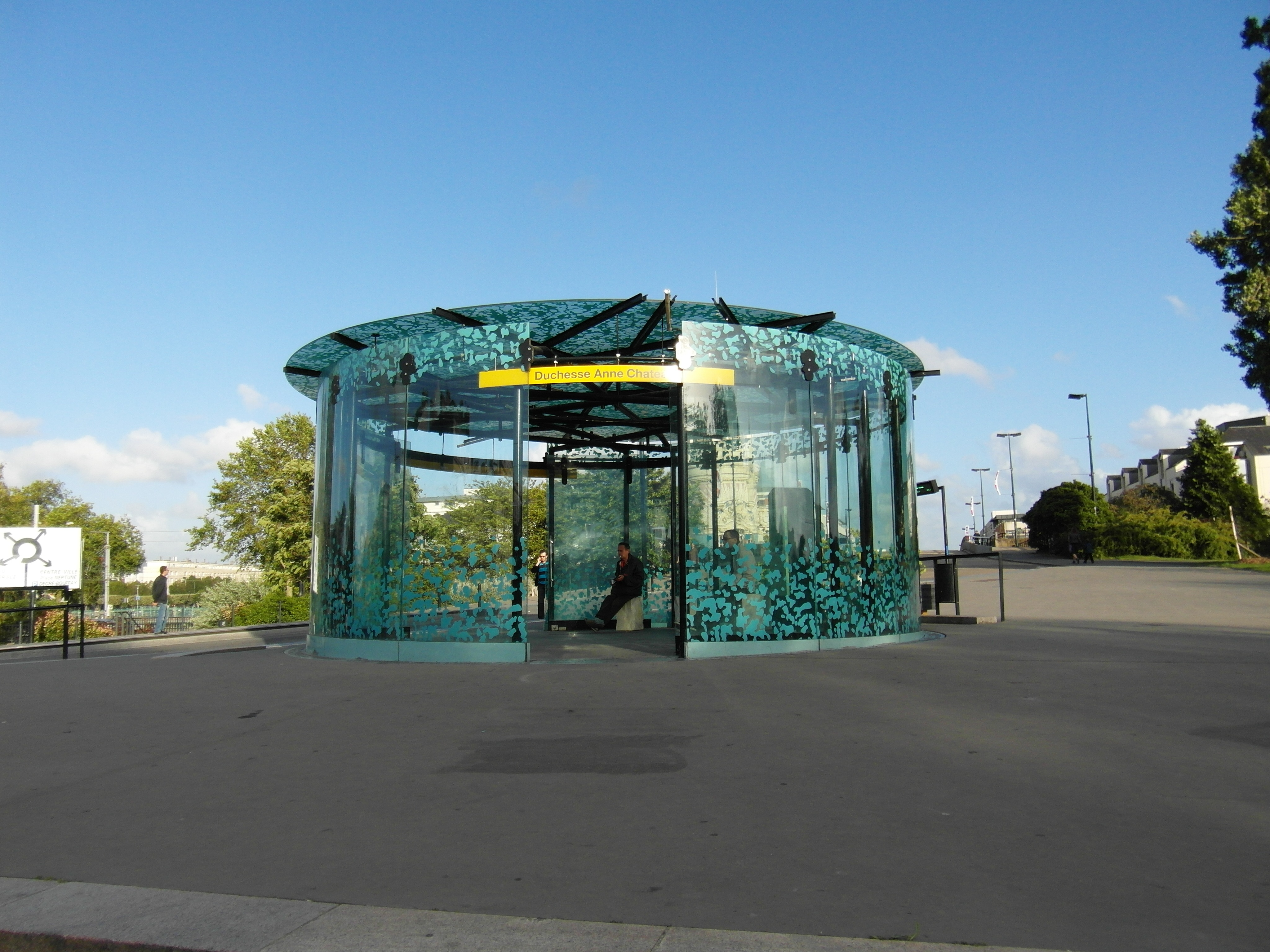 Bus à haut niveau de service - Bus Rapid Transit - Bussystem auf Eigentrasse